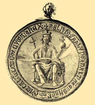 Béla IV. korunovace